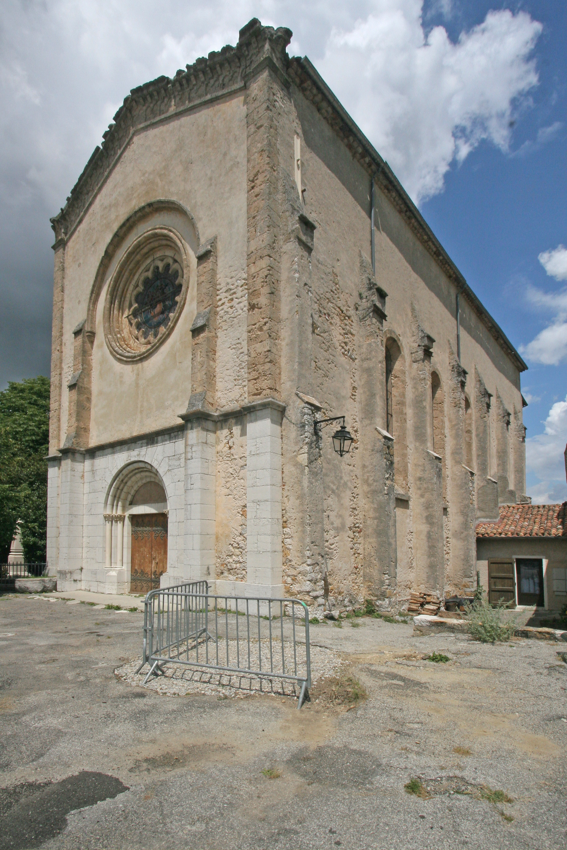 Église Notre-Dame de Vauvert (La Palud-sur-Verdon)